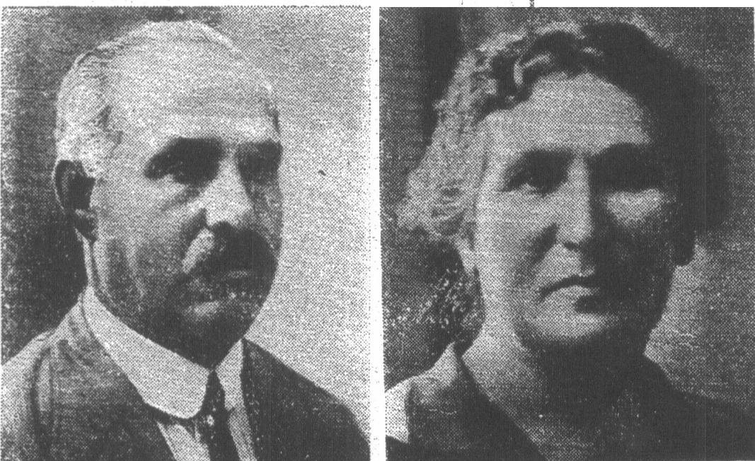 שרה ויוסף עזריהו